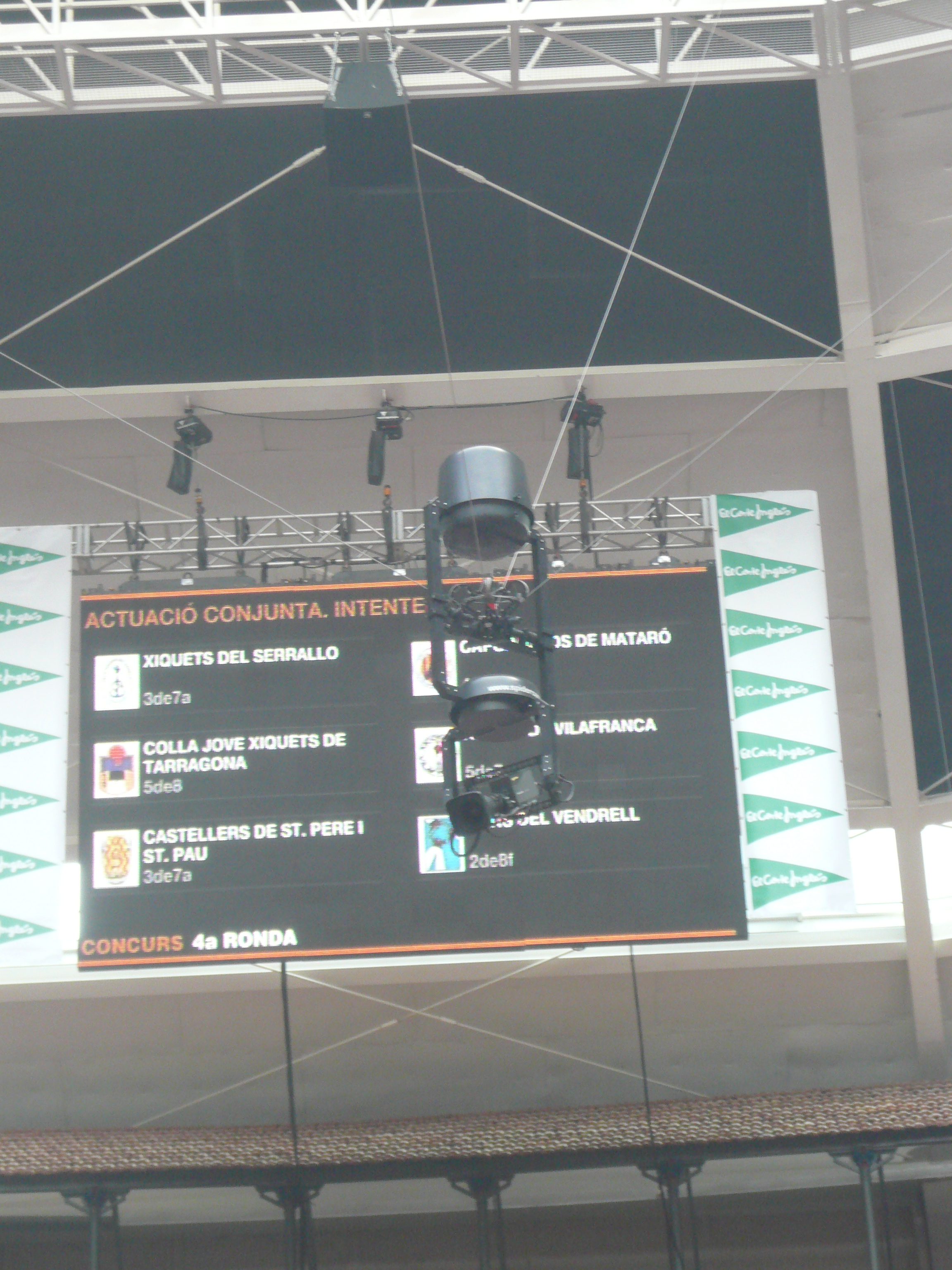 Concurs de Castells 2010, a la plaça de Toros de Tarragona, rebatejada com a Tarraco Arena. Object location41° 06′ 51.64″ N, 1° 14′ 43.03″ E